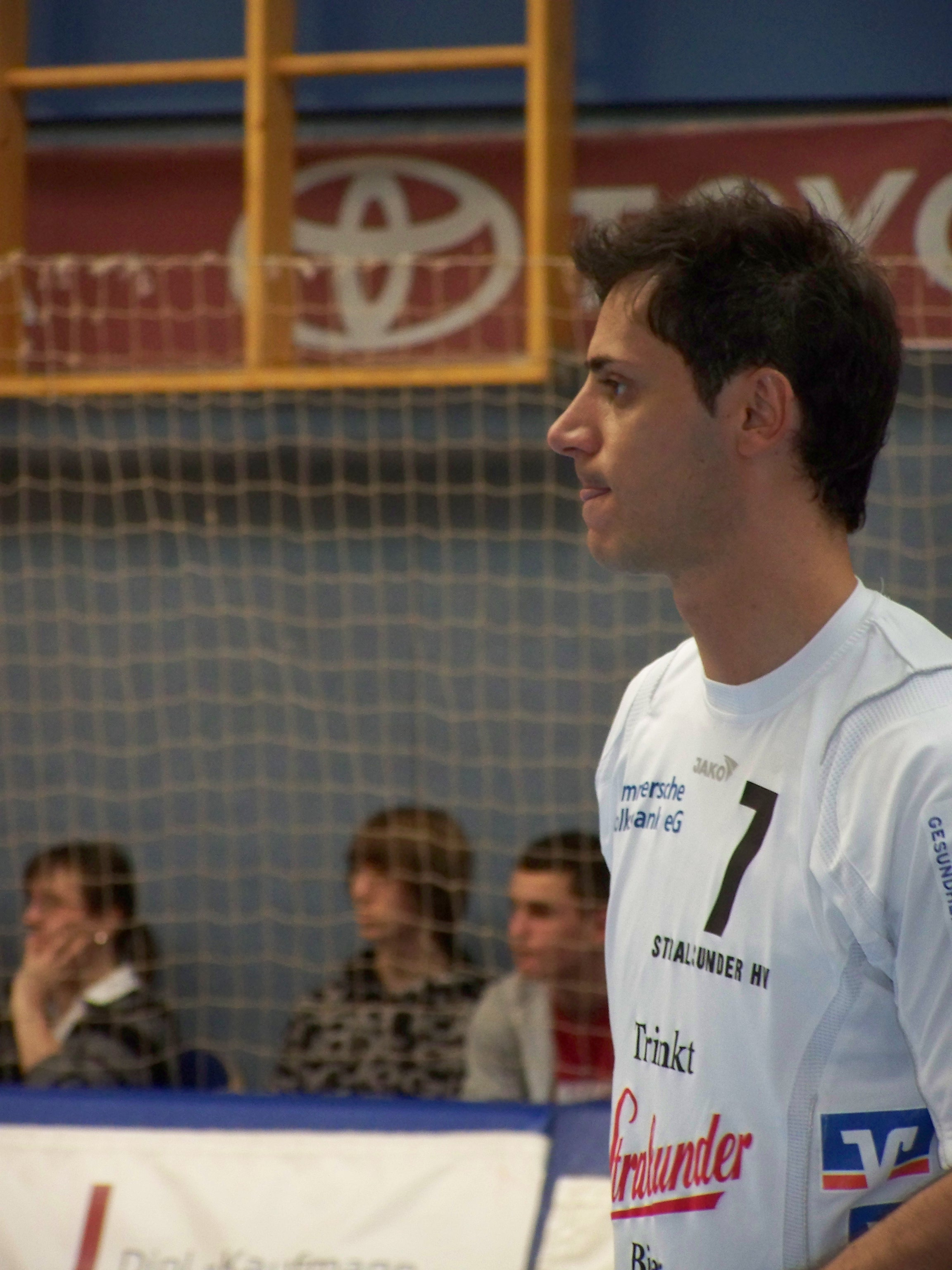 Der griechische Handballspieler Nikolaos Samaras vom Stralsunder HV beim Bundesligaspiel gegen den MT Melsungen am 4. April 2009.